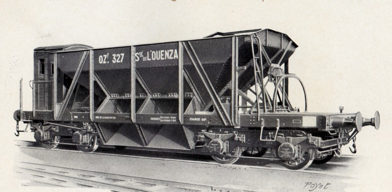 Wagon-trémie à guérite CFMCF, OZf n° 327, Société des mines de l'Ouenza, Algérie.